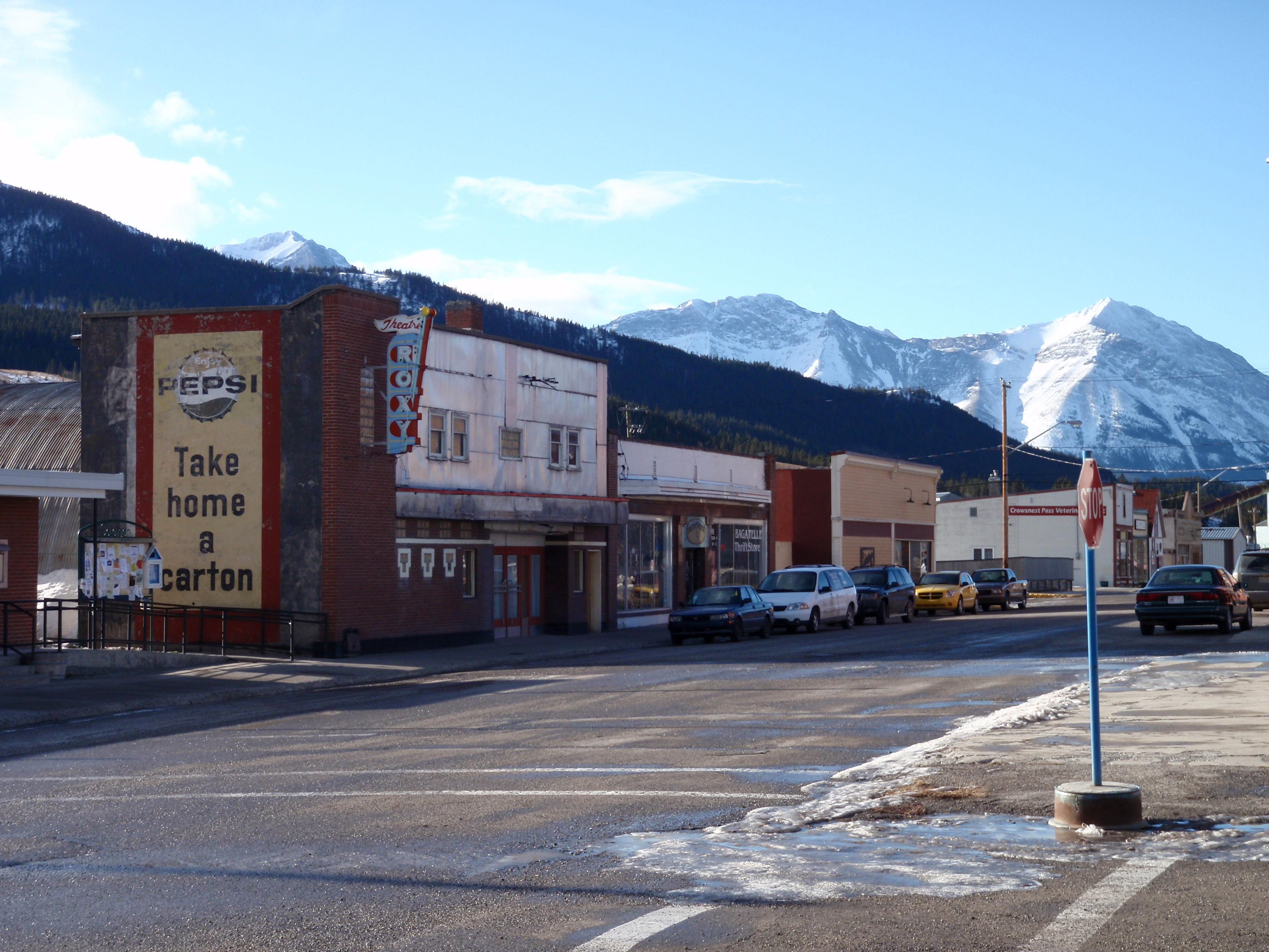 Village de Coleman en Alberta